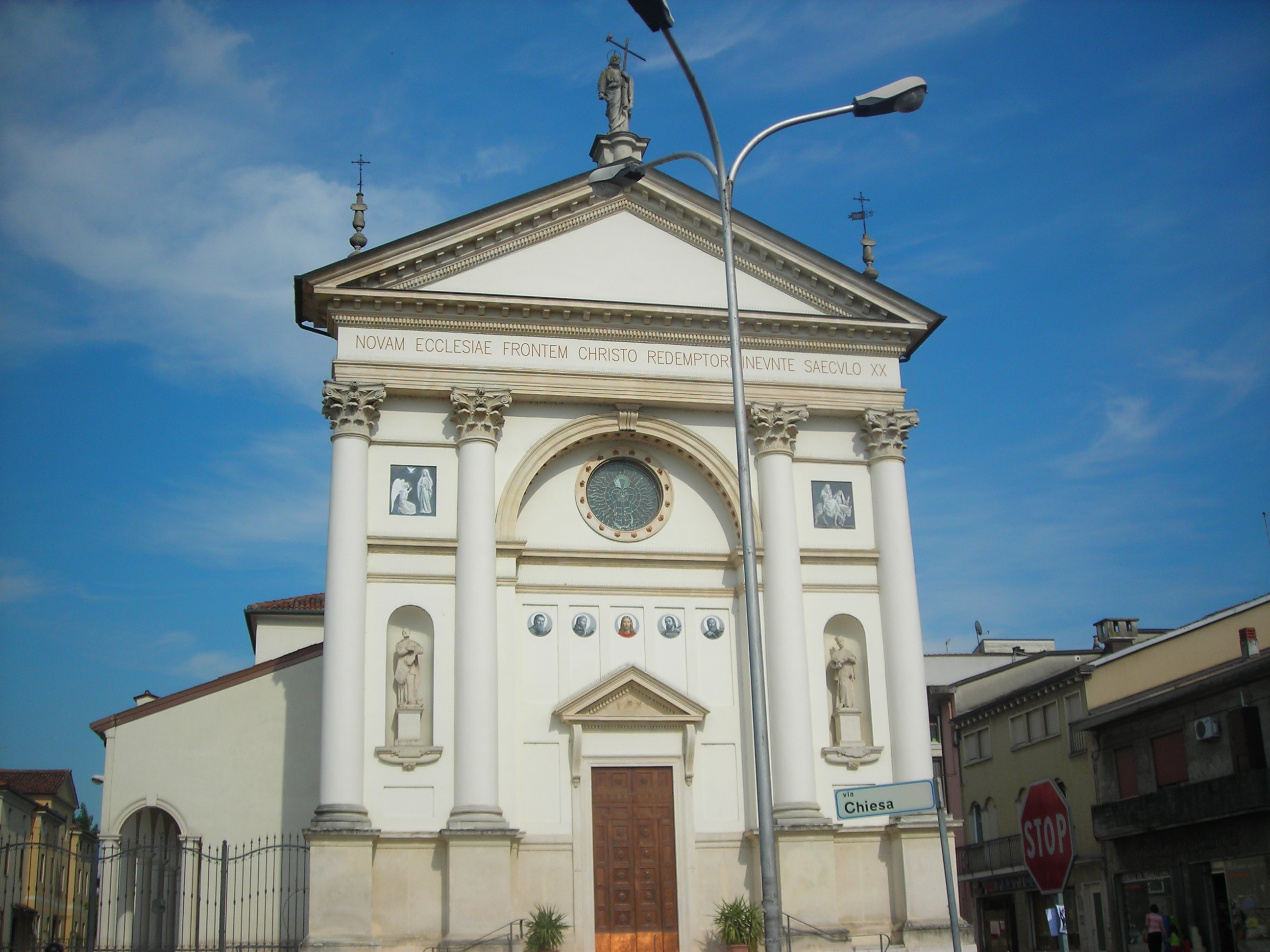 Chiesa di San Matteo Apostolo a Cavazzale di Monticello Conte Otto in provincia di Vicenza